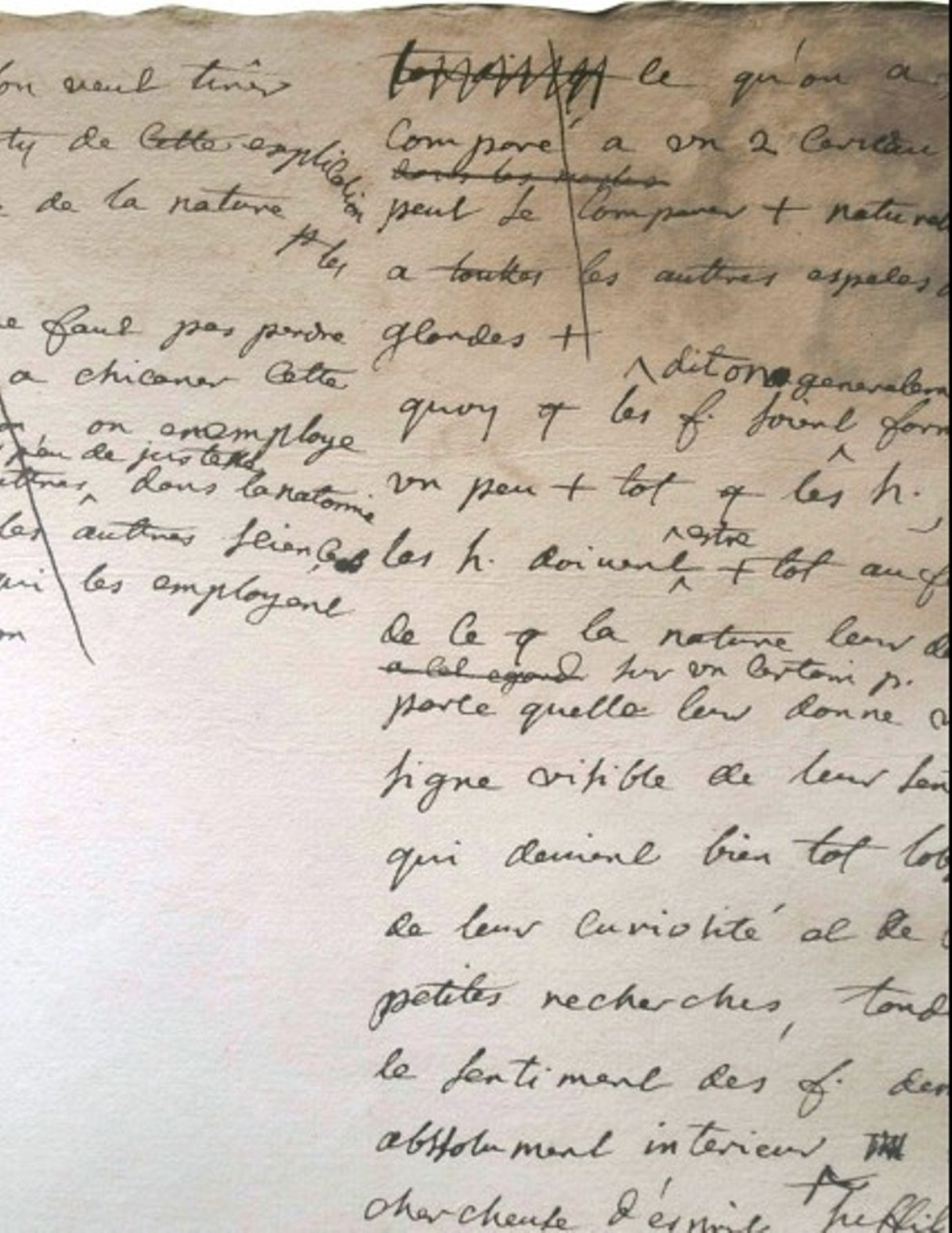 Feuillet manuscrit extrait de l'ouvrage sur « L'égalité des hommes et des femmes » de Madame Louise Dupin, annoté par Jean-Jacques Rousseau.